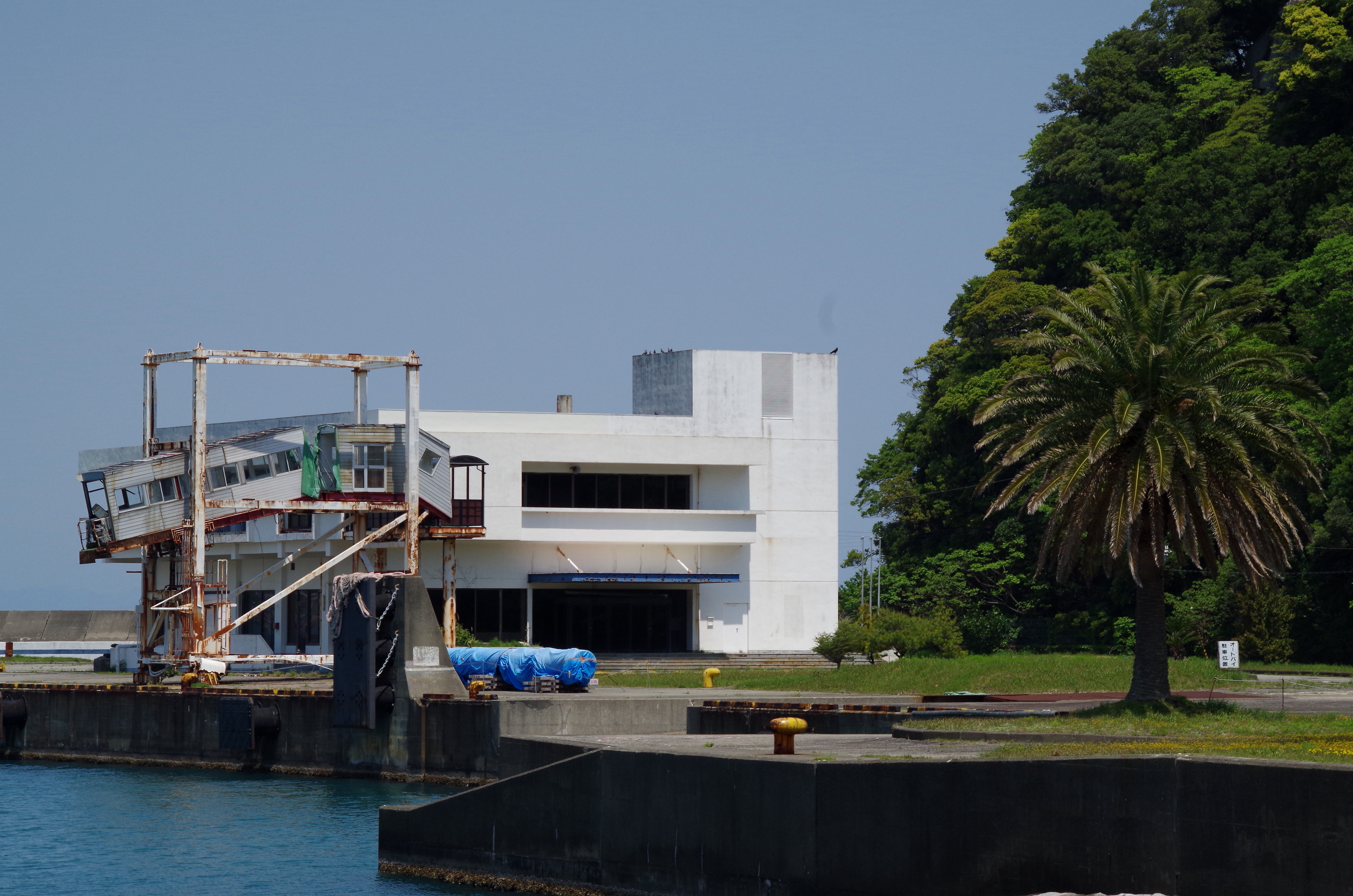 事務所は近くの水底神社の祭事の時に利用してるみたいです。